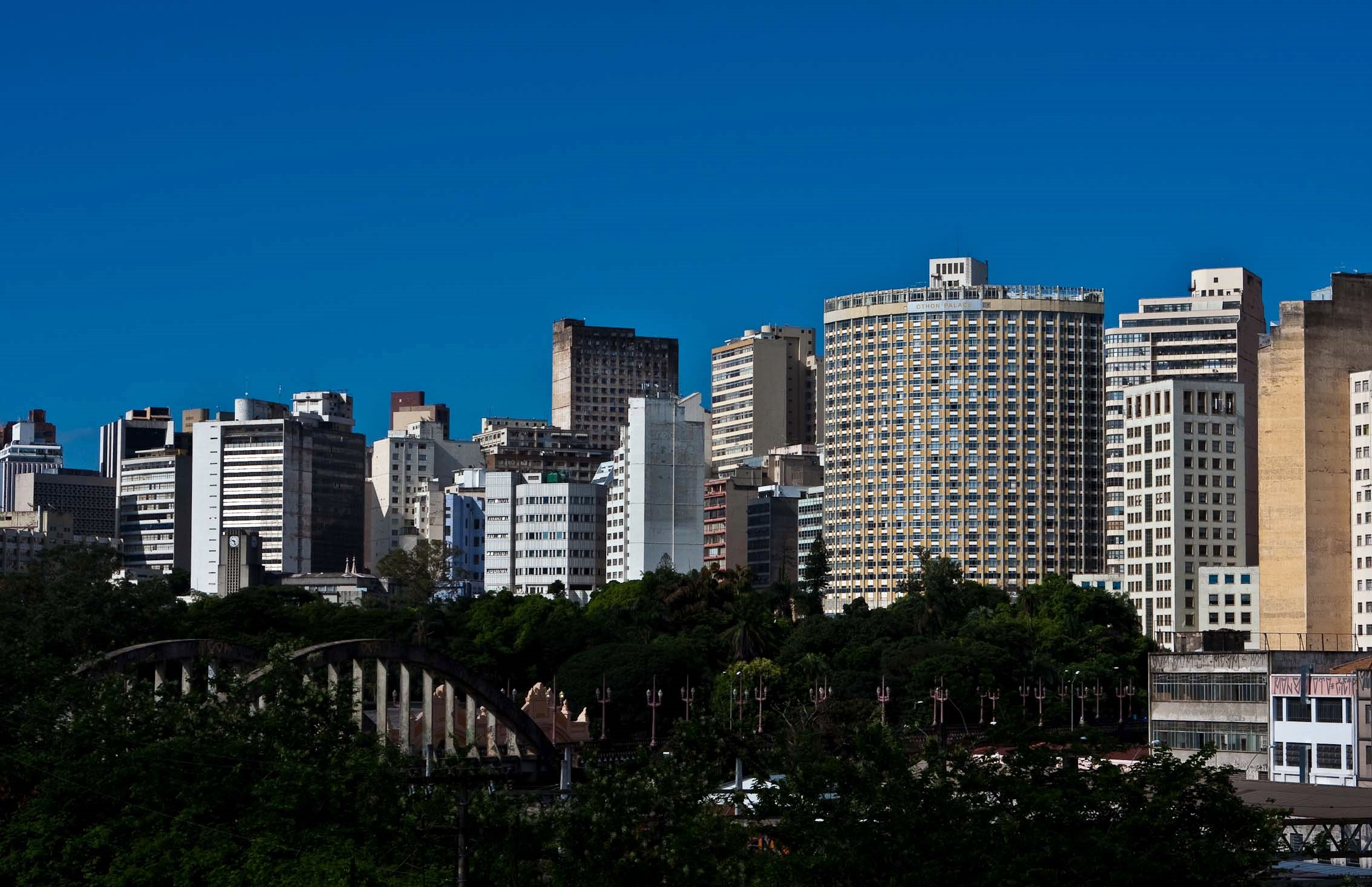 Viaduto Santa Tereza, Belo Horizonte